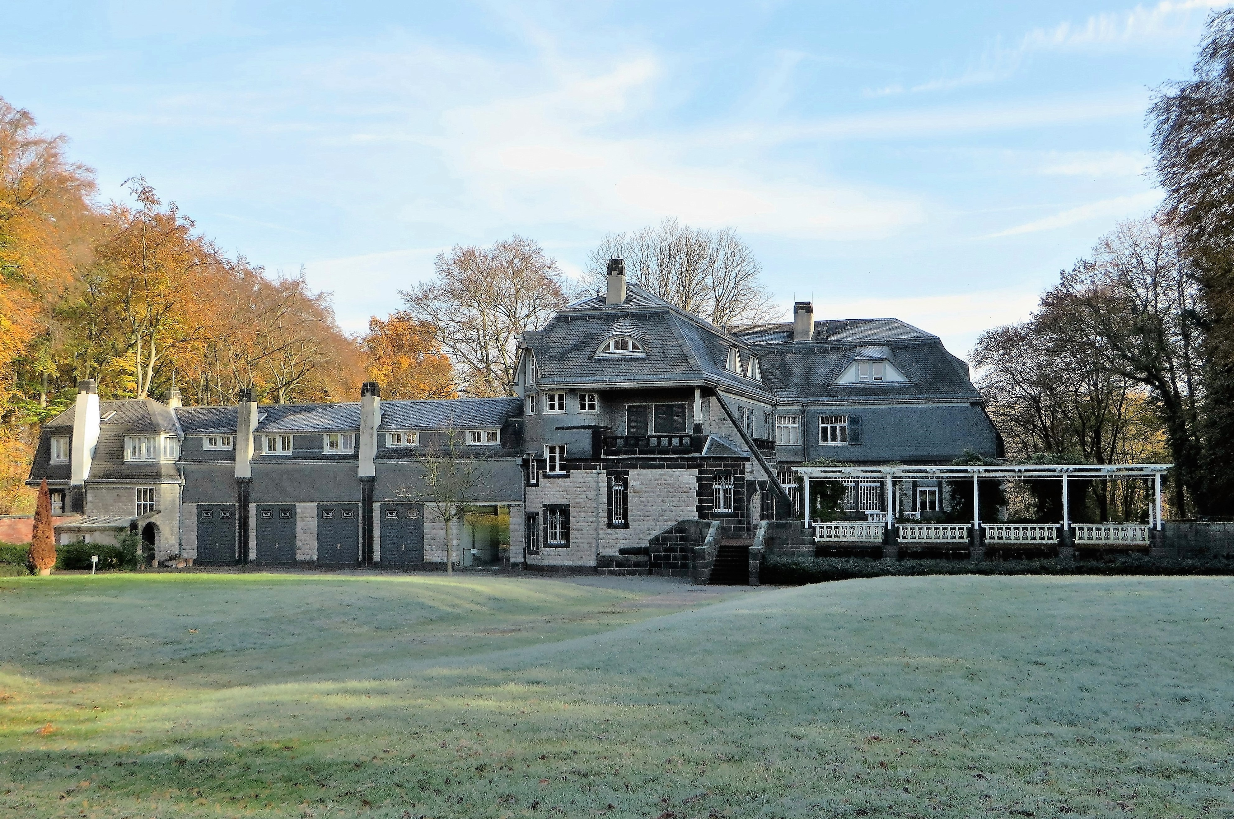 Denkmalgeschützte Jugendstilvilla Hohenhof in Hagen, Stirnband 10. Ansicht von Westen. Das von Henry van de Velde errichtete Gebäude war ab 1908 Wohnsitz der Familie Karl Ernst Osthaus.